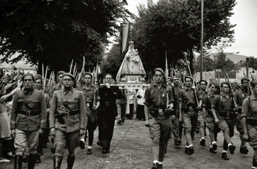 Título original: Llegada a Irun de la Virgen de Covadonga procedente de París (2/3) Localización: Irún (Guipúzcoa)